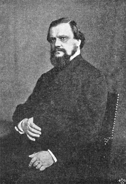 Albert Falk, preußischer Kultusminister, Foto um 1900